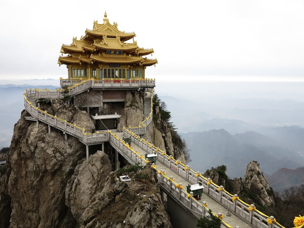 Điện Linh Quan, một ngôi điện trên núi Lão Quân, tín ngưỡng Đạo giáo Trung Hoa.